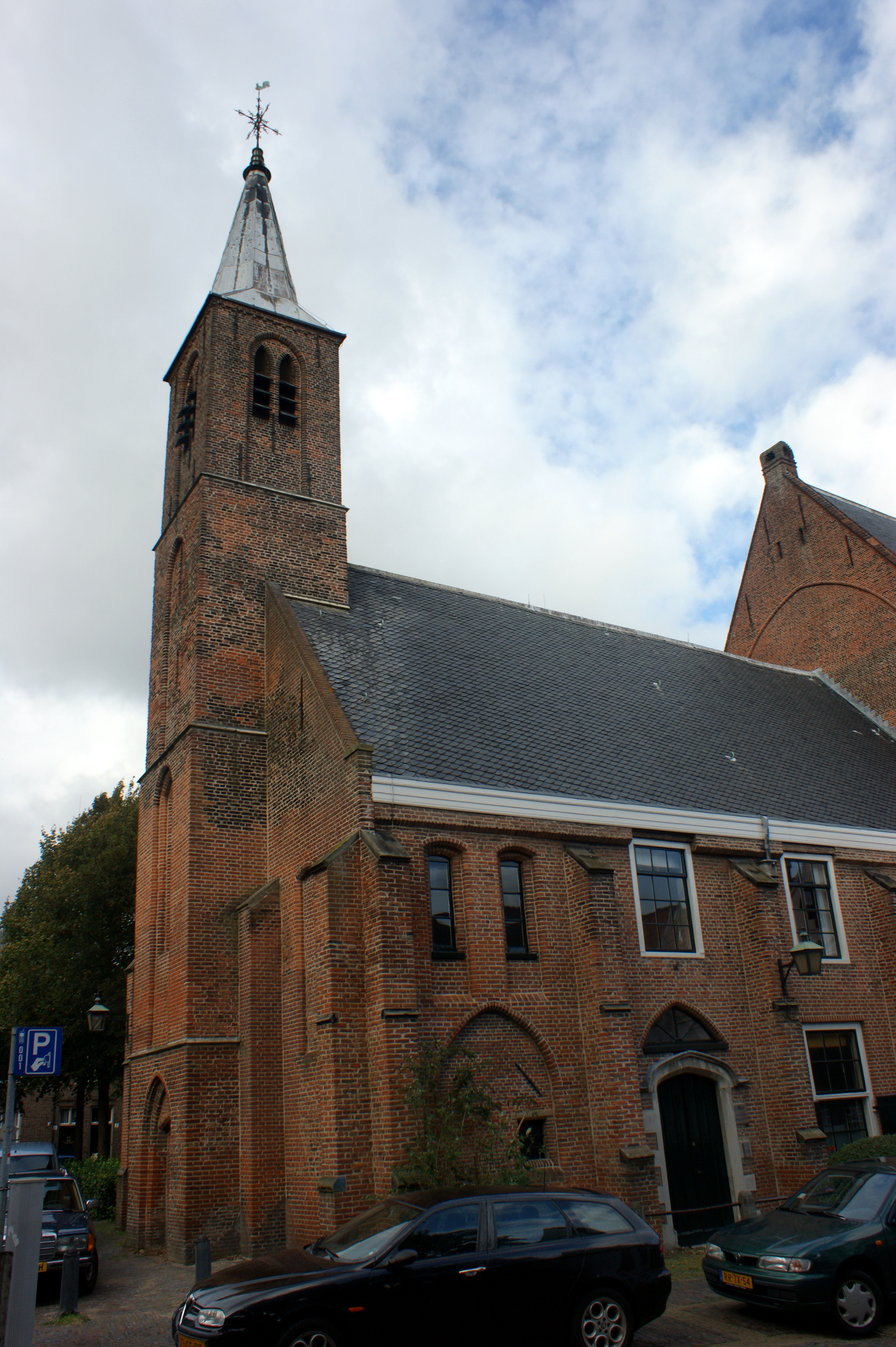 Haalem - Waalse Kerk